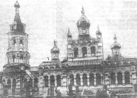 Свято-Троицкий храм в Большой Мартыновке, Донецкий округ Области Войска Донского.